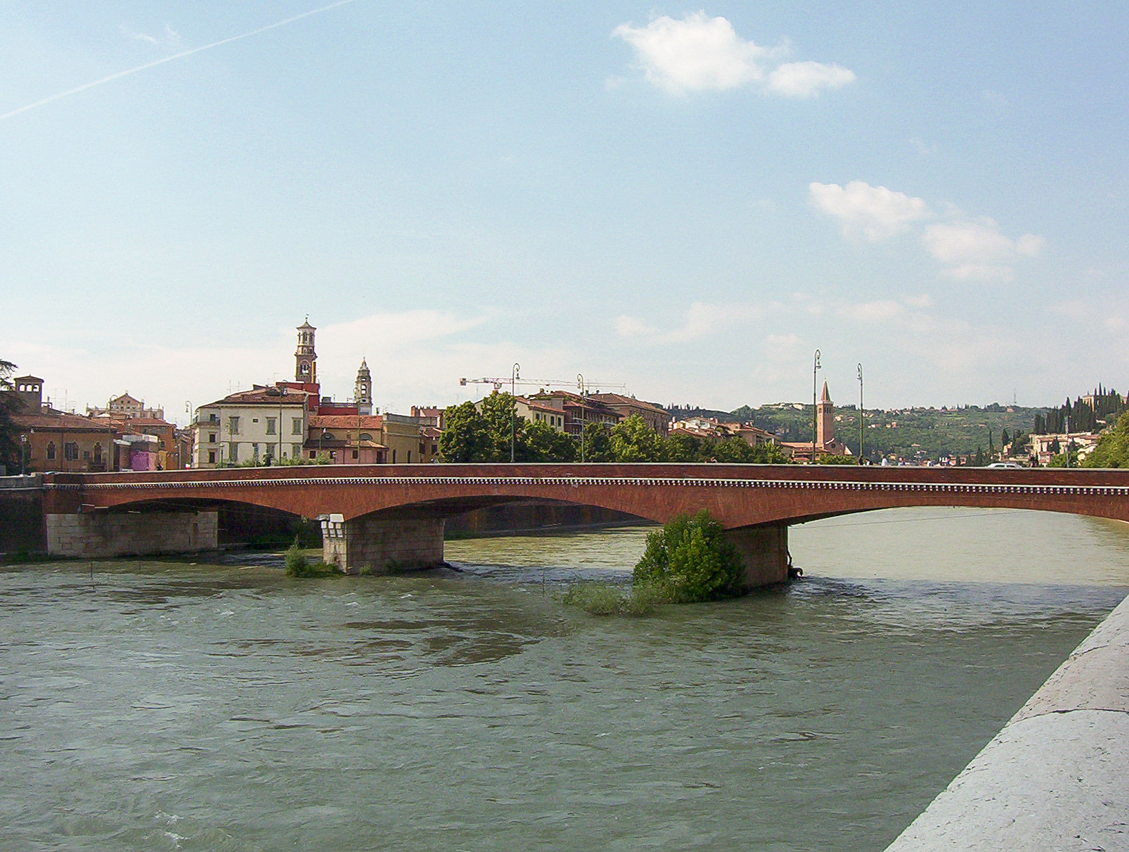 Ponte Navi a Verona